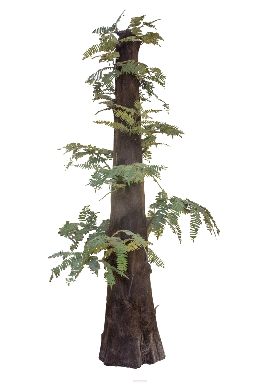 Ricostruzione in scala 1:1.